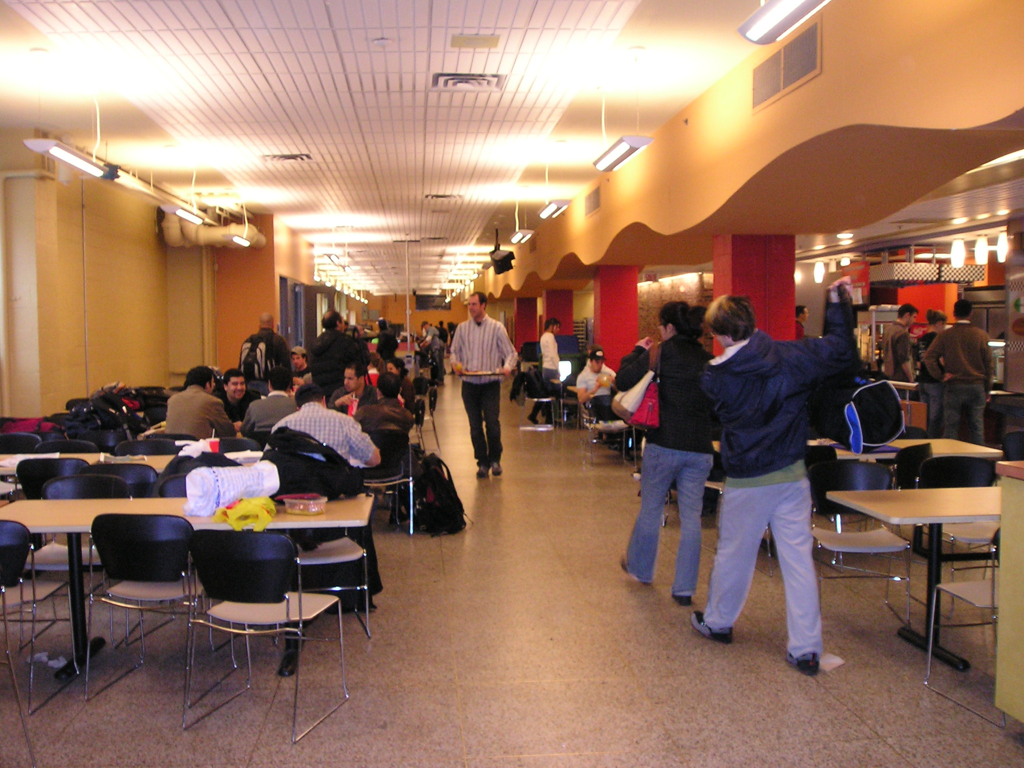 Cafeteria at Ecole Polytechnique de Montreal in 2007